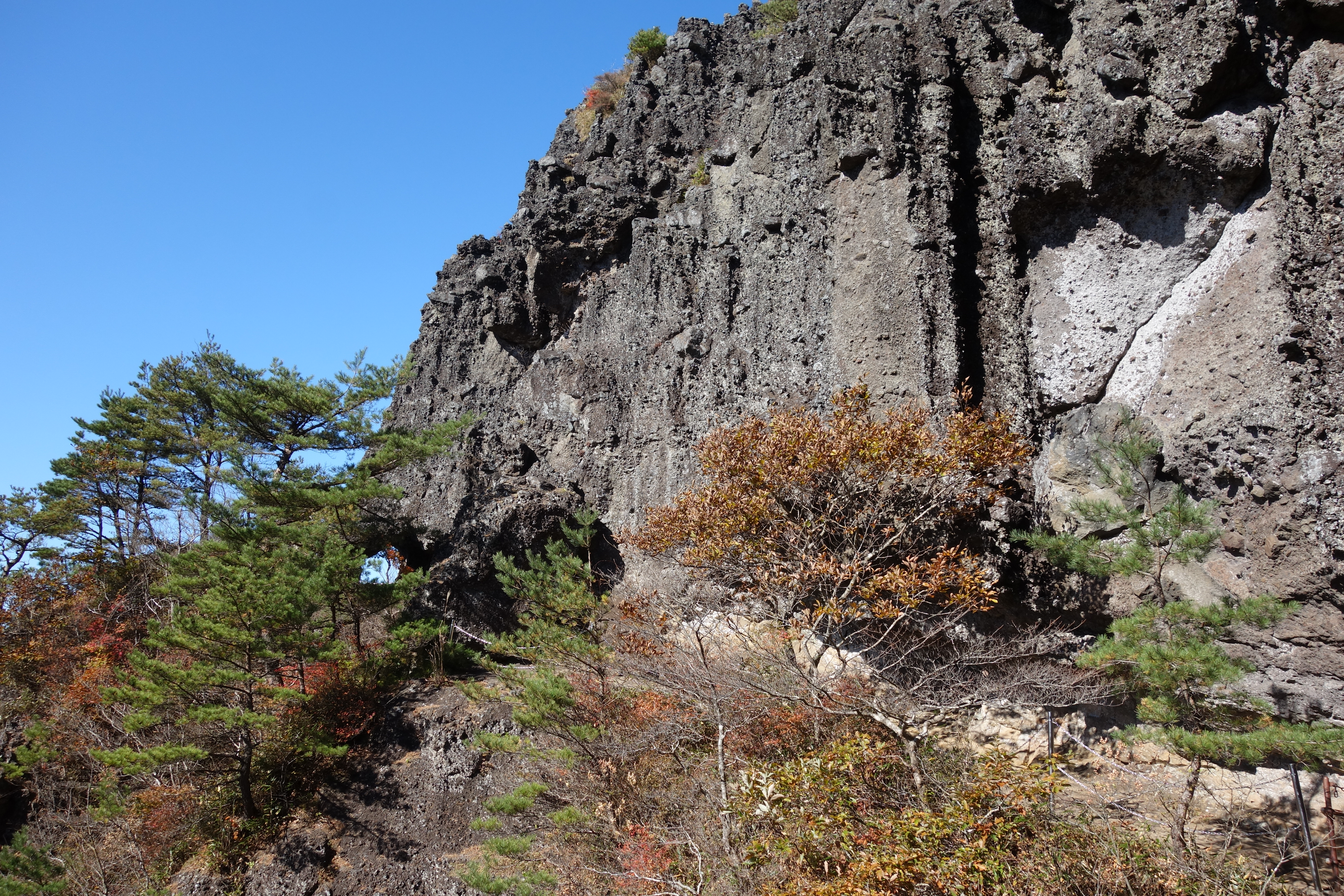 親不知子不知からの護摩壇